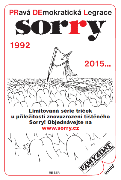 Titulní stránka časopisu Sorry z 1. 4. 2015